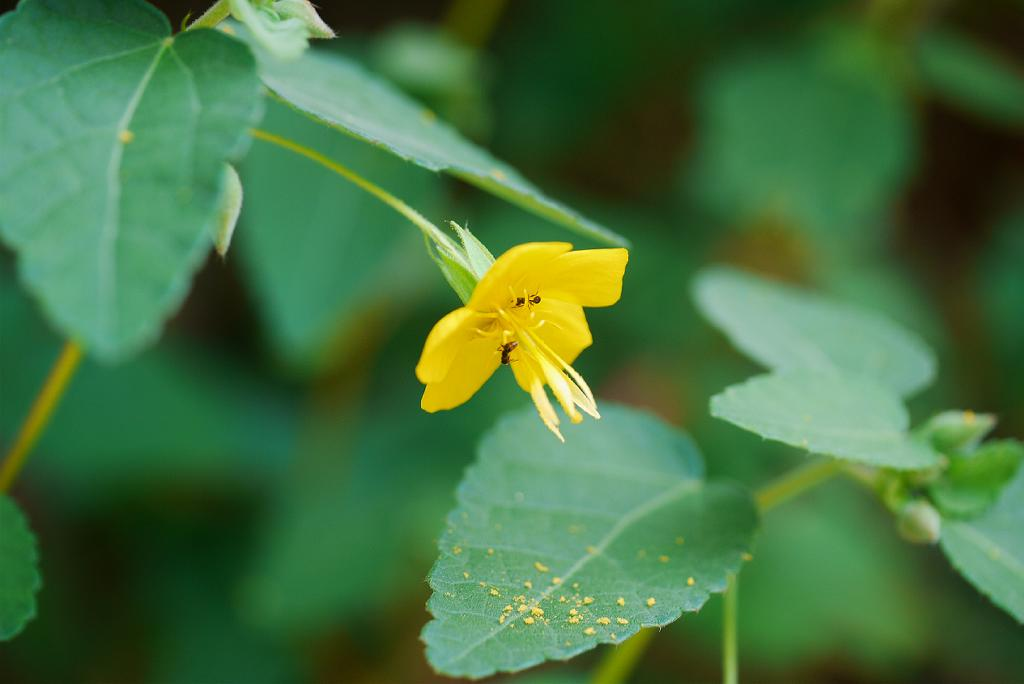 Corchoropsis crenata：カラスノゴマ 2010/09/19 和歌山県田辺市：Tanabe City. Wakayama Pref. Japan